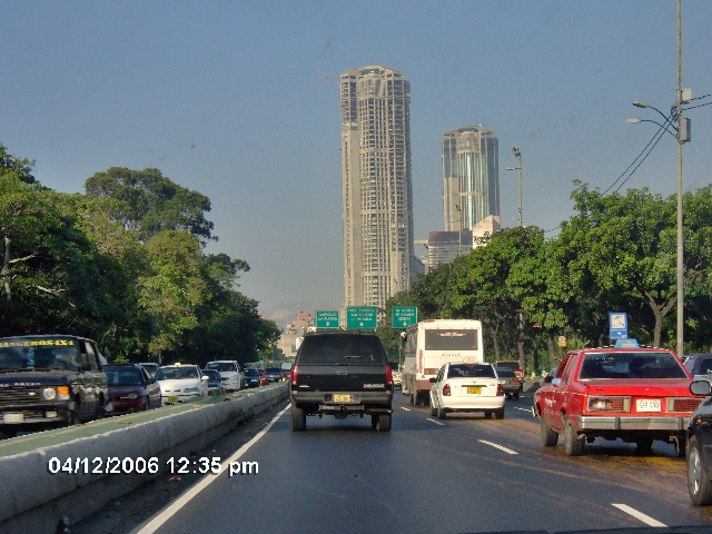 Torres de Parque Central